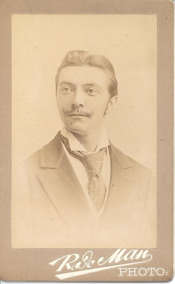 Photo de l'architecte Henri van Dievoet, par le photographe R De Man, à Bruxelles, vers 1896